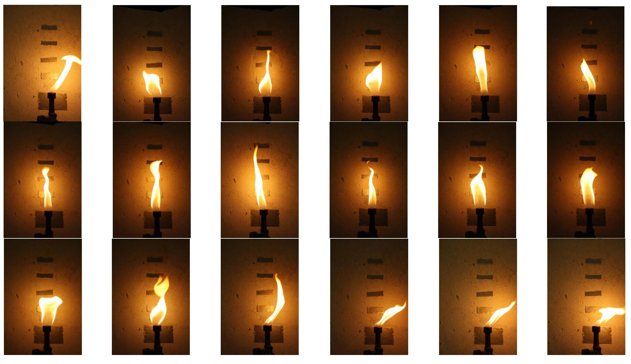 Pulserende flamme, hvor flammehøyden varierer med tid.